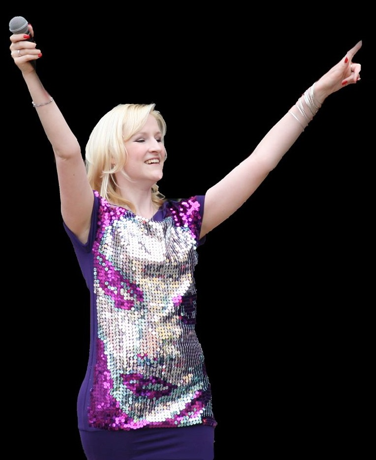 Patricia Larraß beim Konzert beim Bautzener Frühling 2015